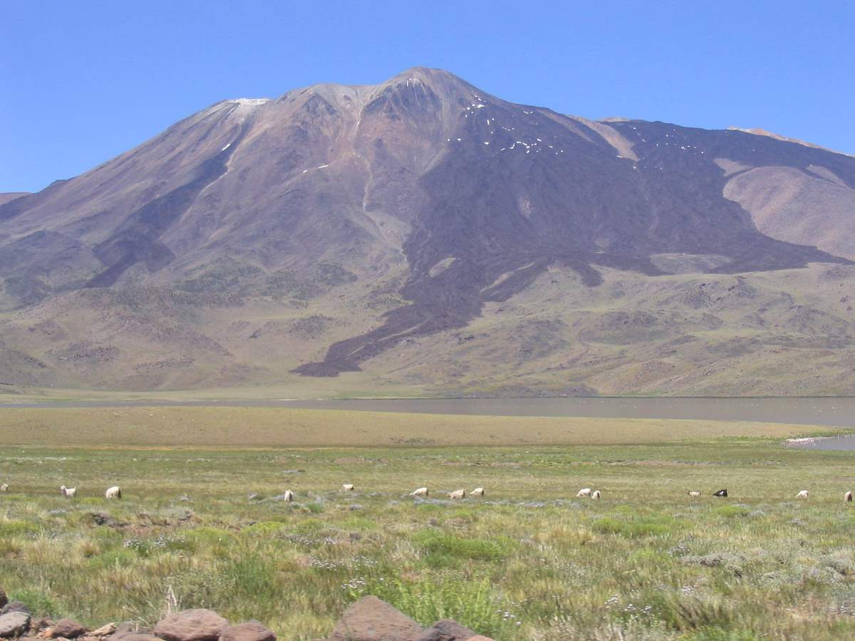 Volcán Tromen en la provincia del Neuquén, Argentina